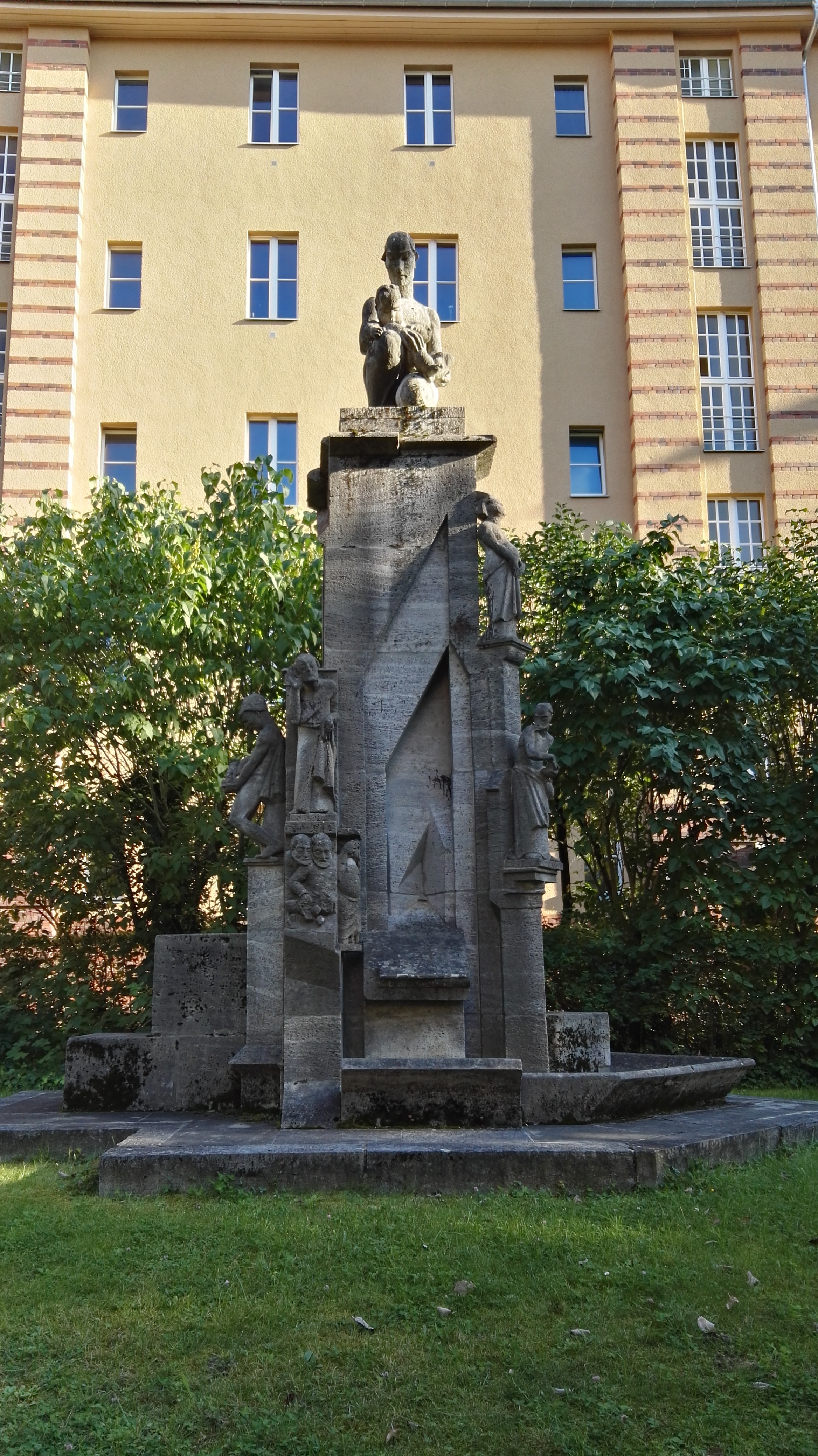 Denkmalgeschützter Mutter-Kind-Brunnen von Arminius Hasemann in der Rauenthaler Staße an der Einmündung der Ahrweilerstraße in Berlin-Wilmersdorf